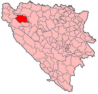 Općina Sanski Most u Bosni i Hercegovini